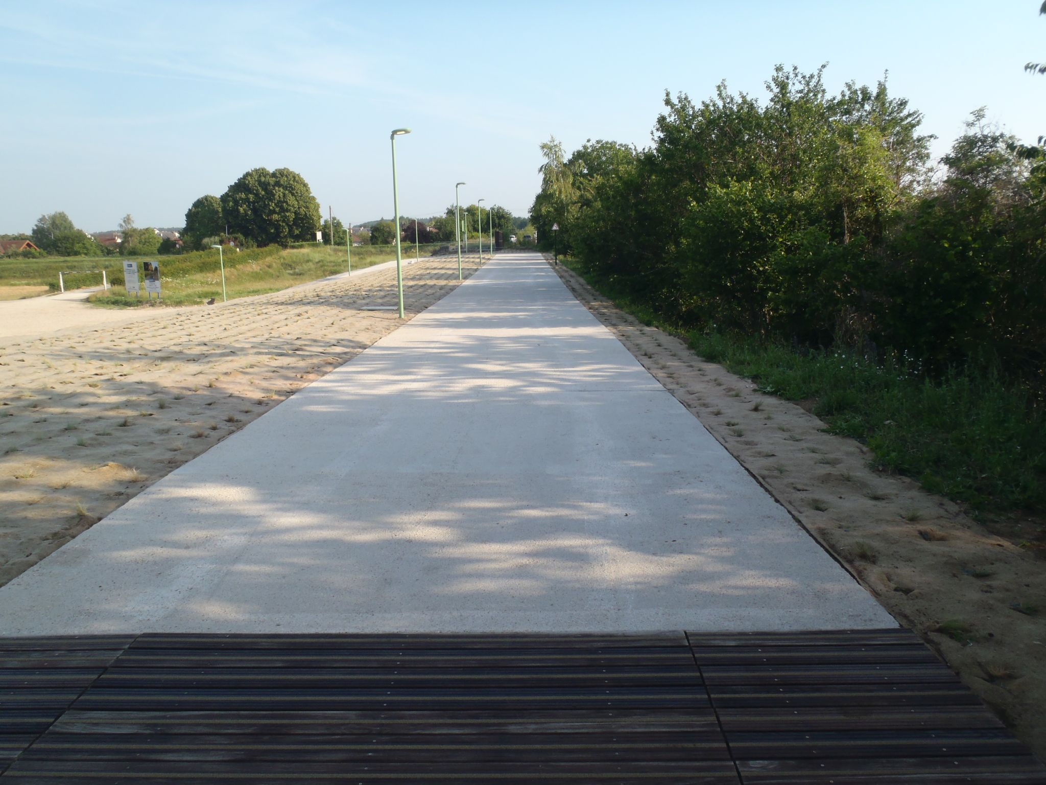 Accès au viaduc après sa transformation en voie verte, piétons, vélos.